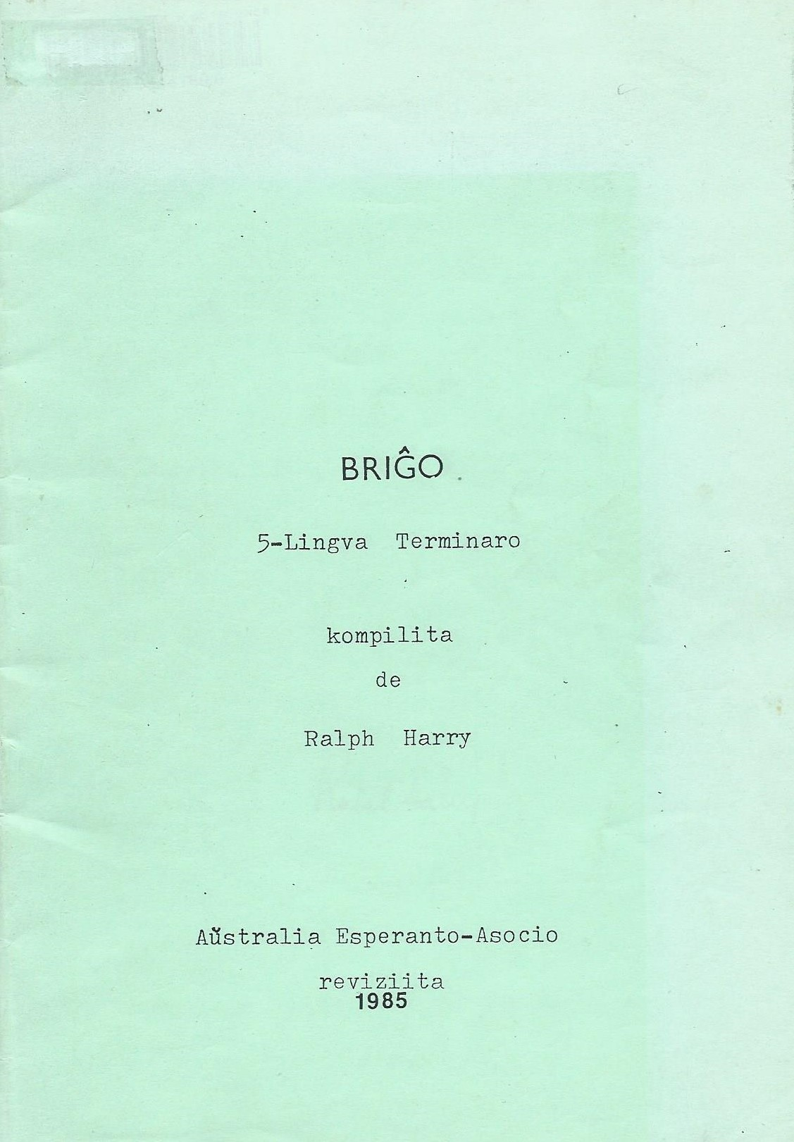 kovrilo de "Briĝo - 5-lingva terminaro", 1985